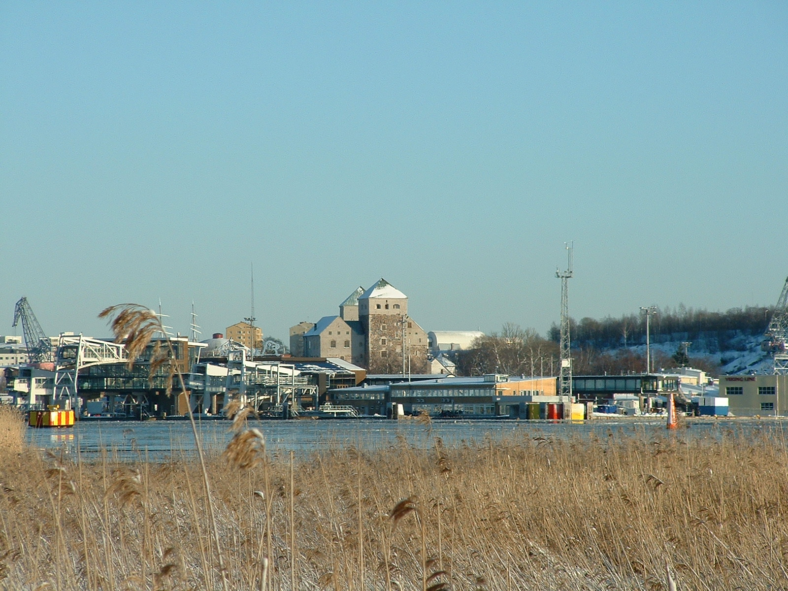 Järviruokoa talvella.